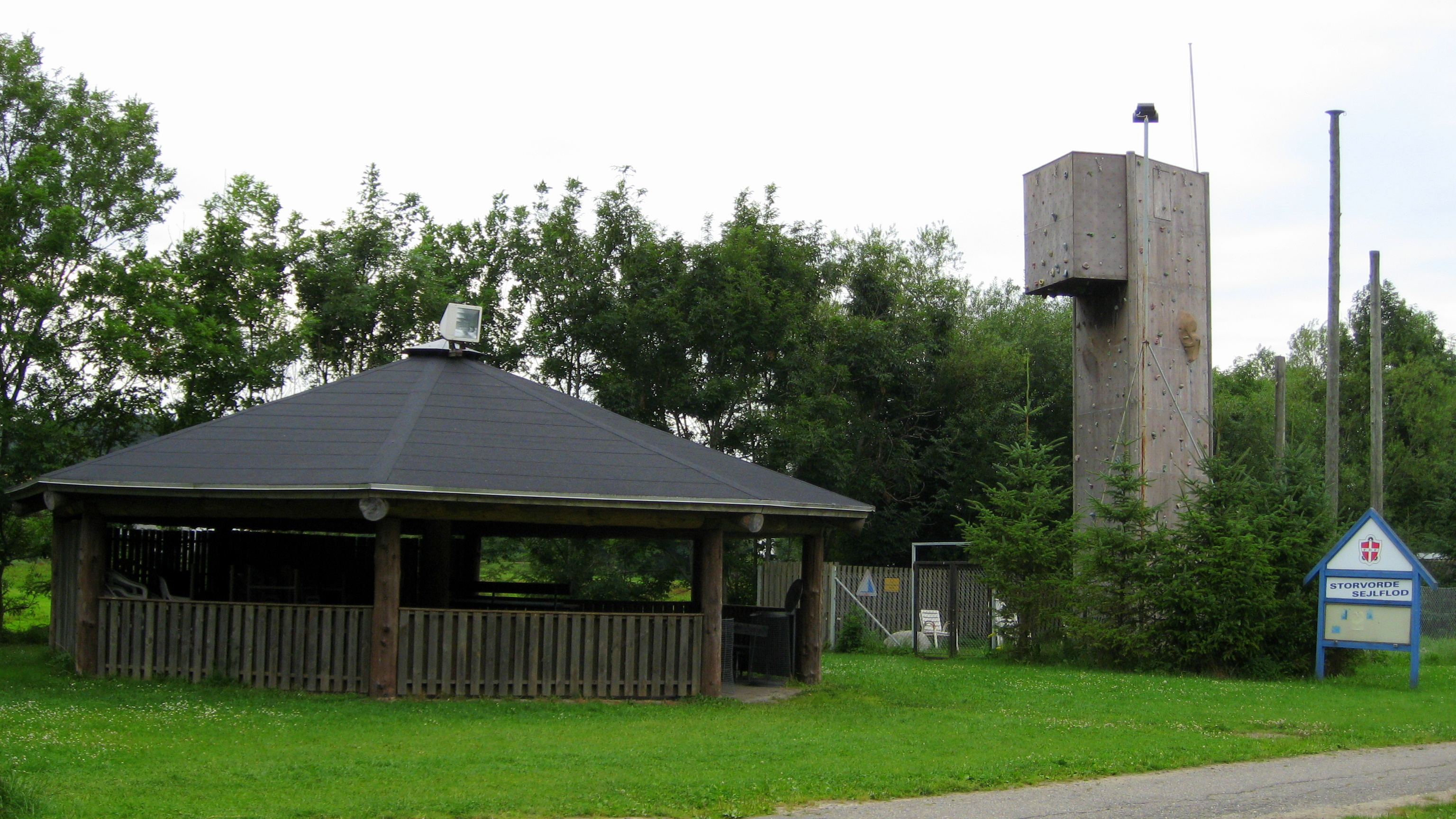 FDF lejren Storvorde Sejlflod